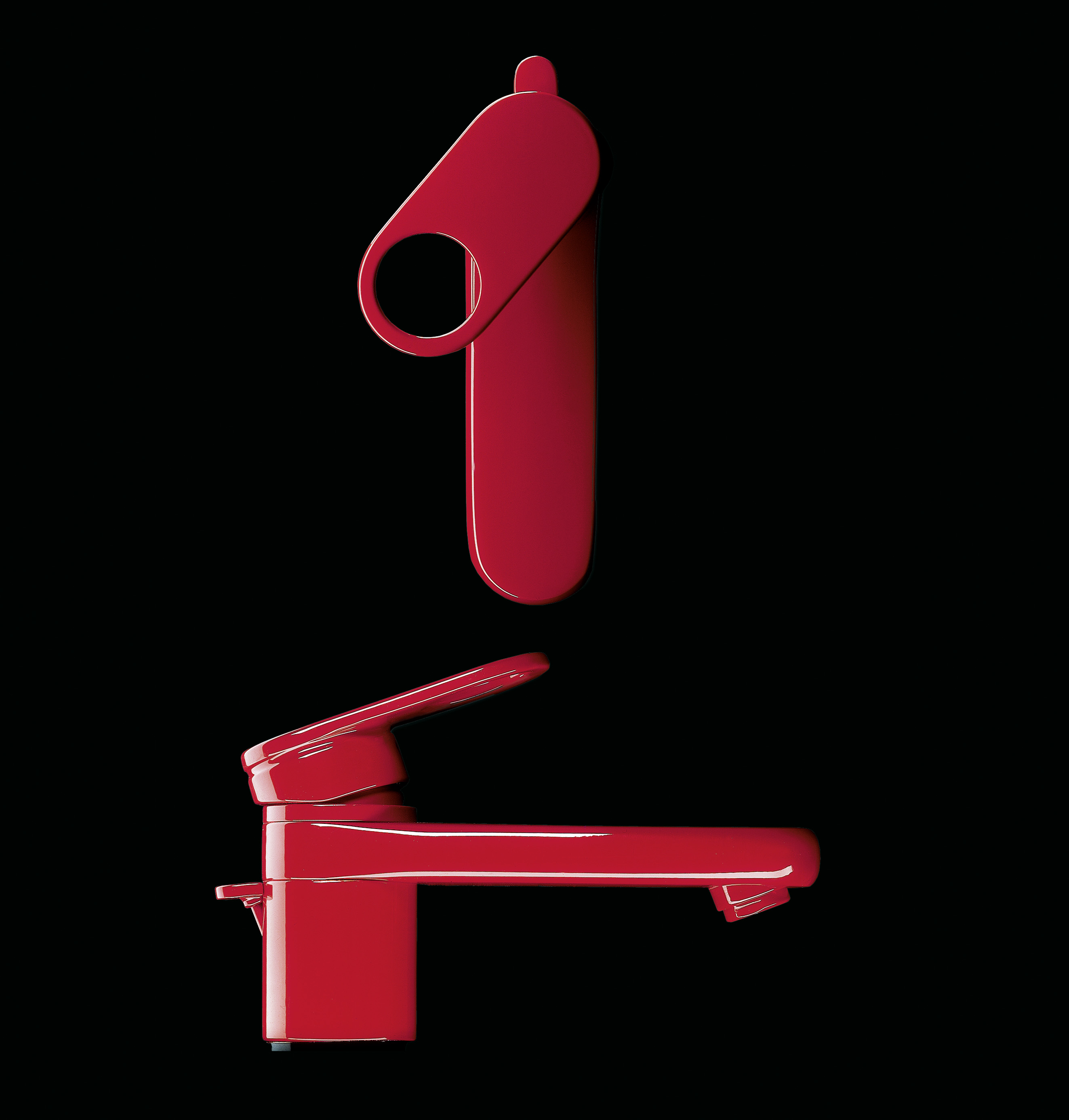 Armatur Domani (Dornbracht)